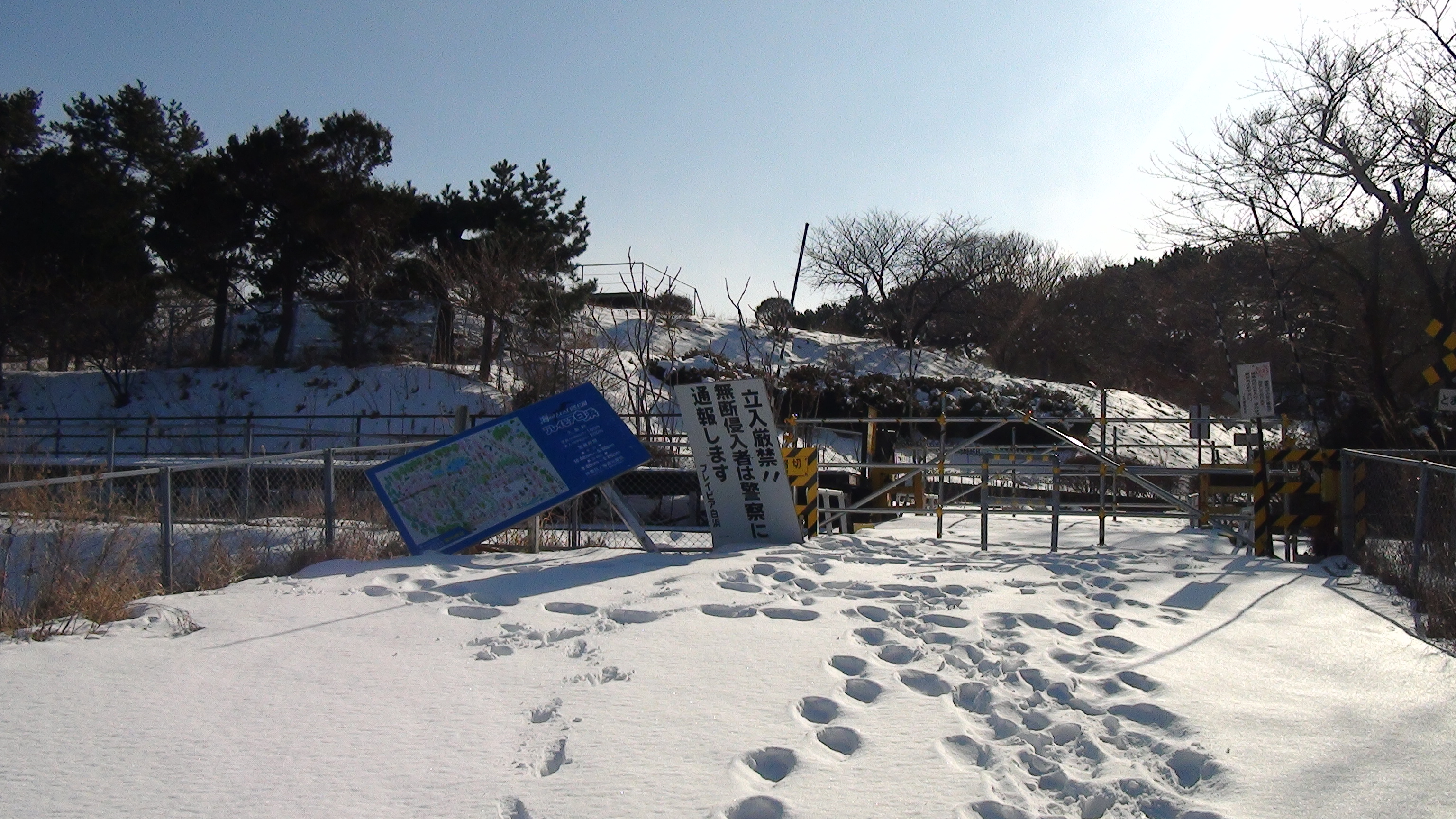 2012/03/03に撮影。